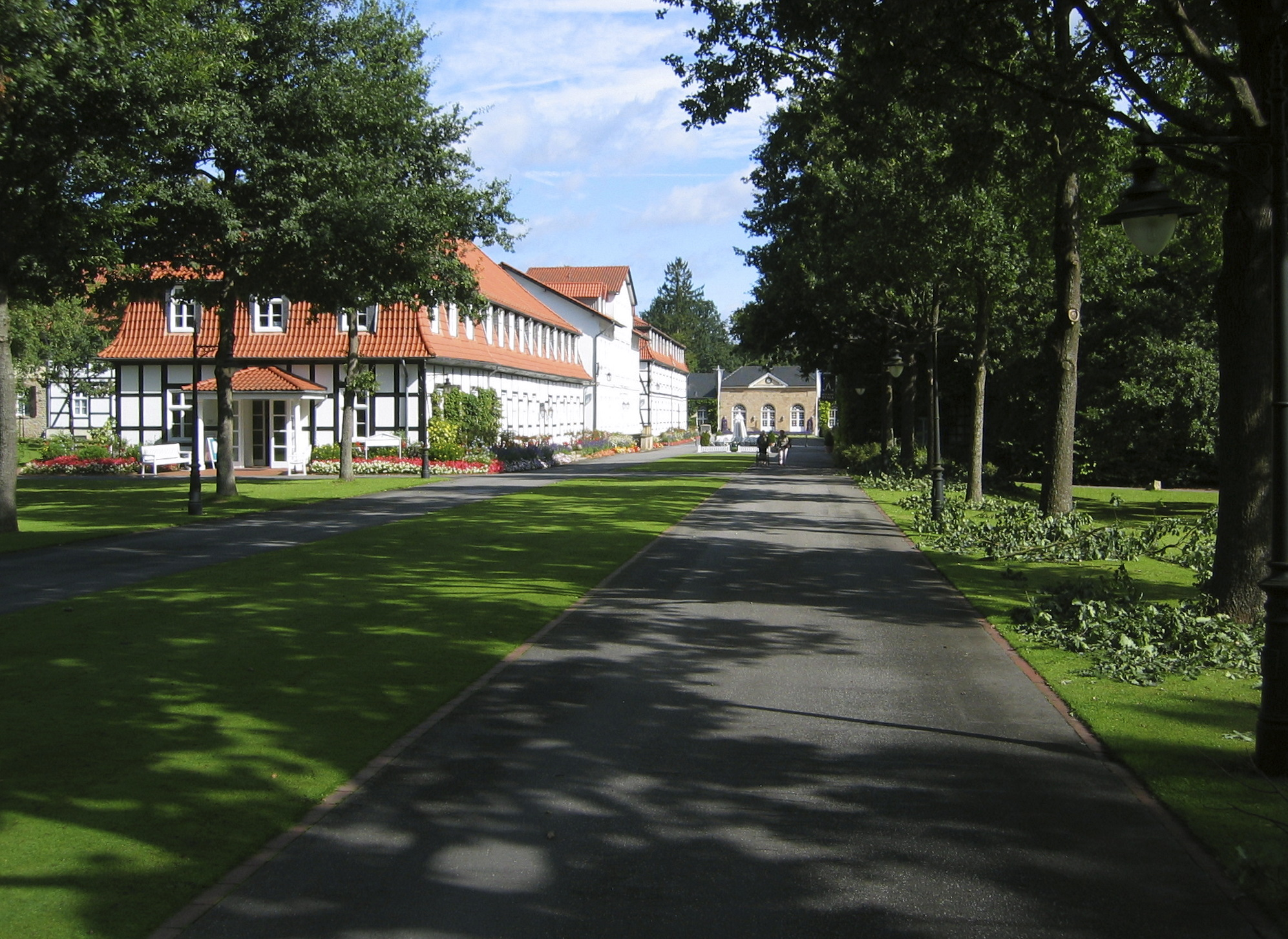 Einfahrt zum Gräflichen Park Bad Driburg (Kurpark) von der Brunnenstraße aus, Bad Driburg, Deutschland.